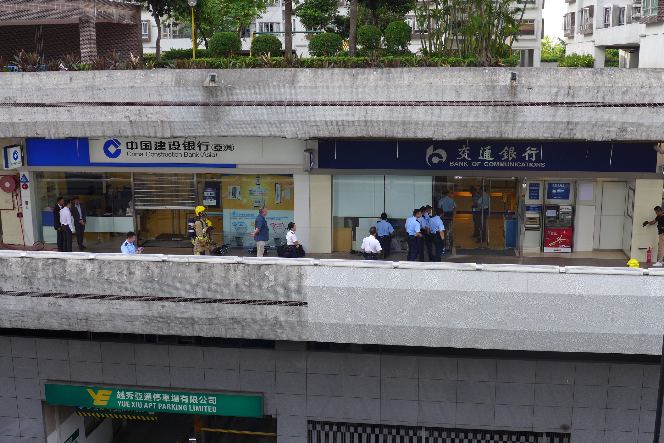 Lucky Plaza Accident